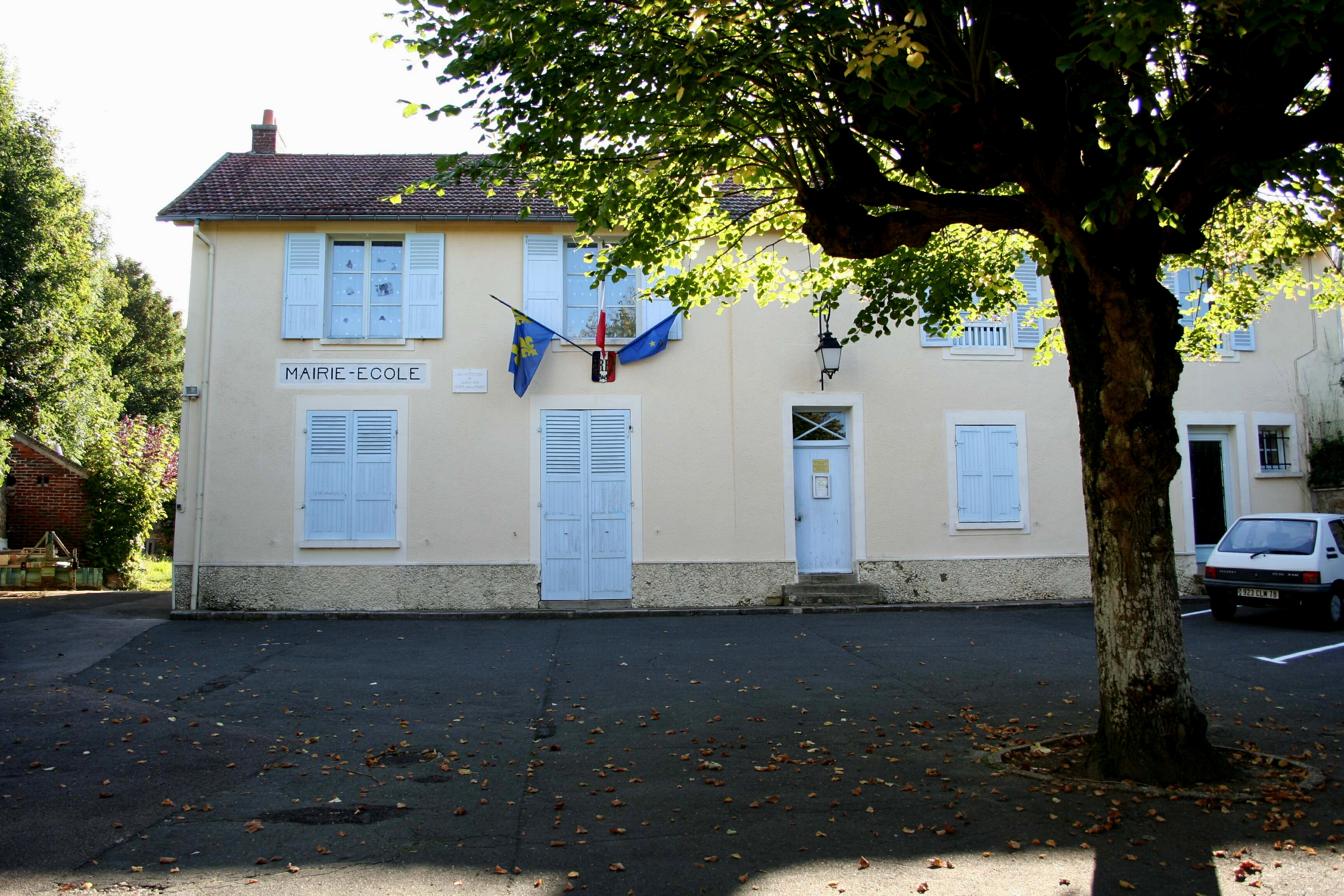 Mairie de Lainville-en-Vexin - Yvelines (France)